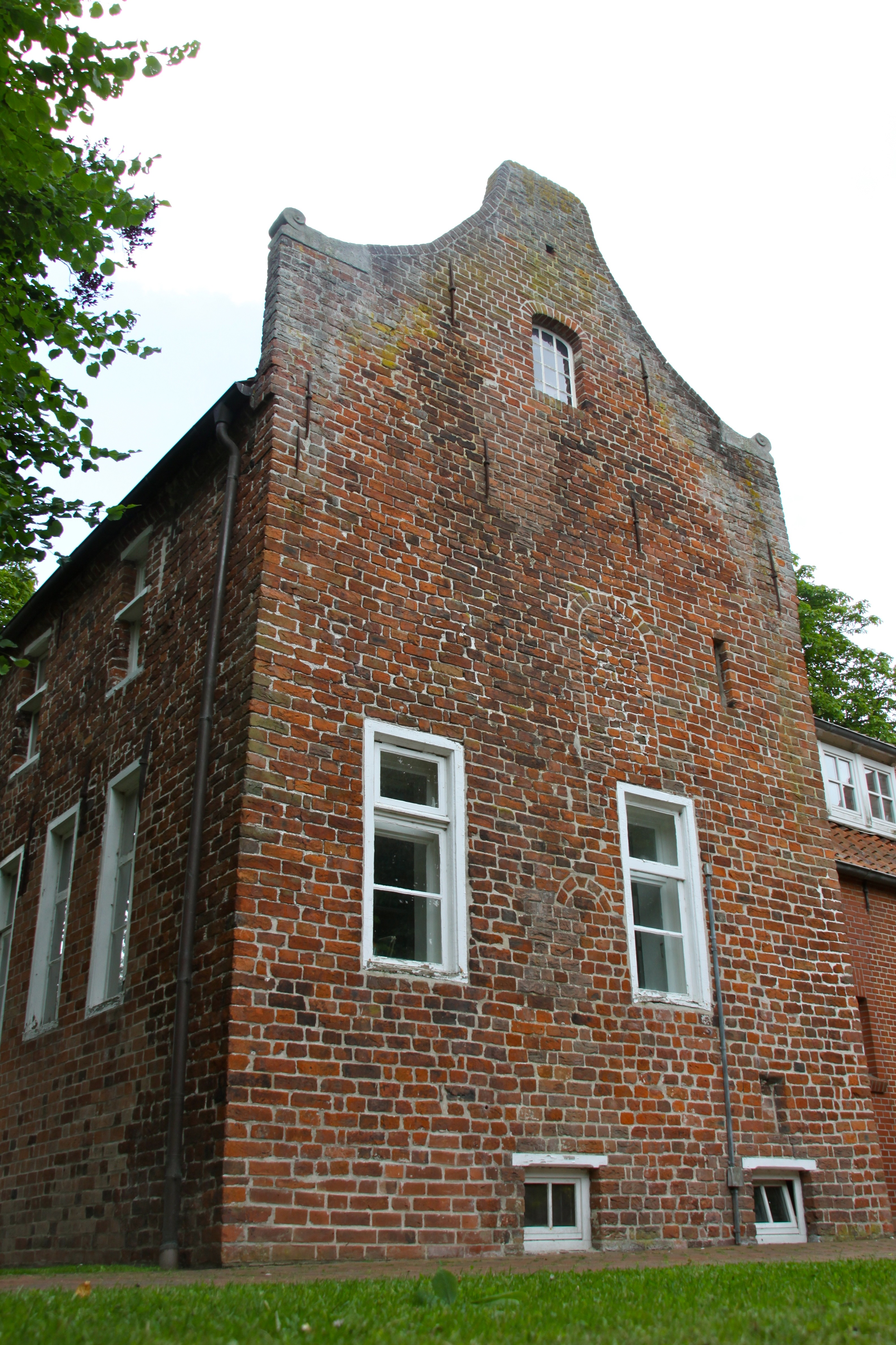 Das ehemalige Pfarrhaus von Engerhafe.